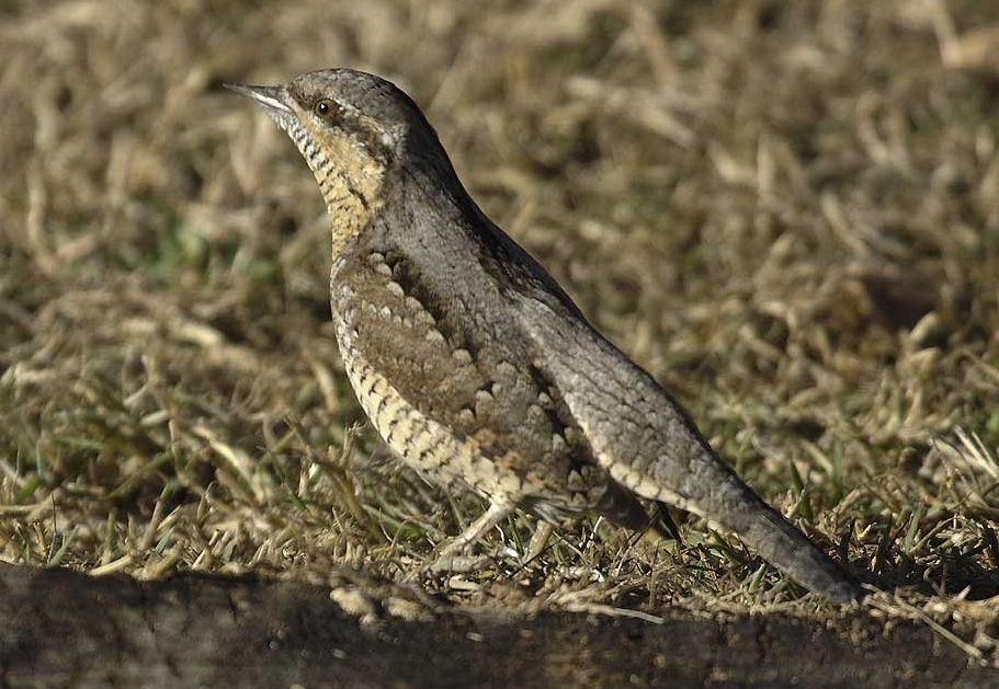 22804 Draaihals / Wryneck